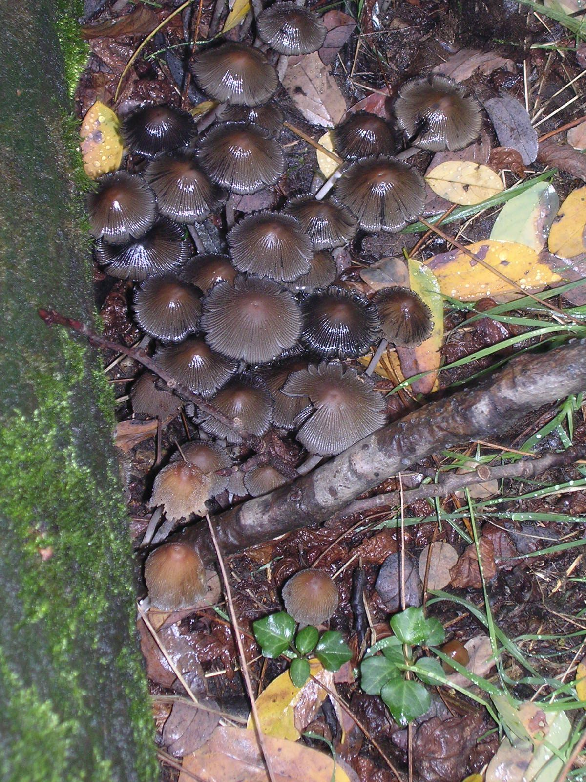 Coprinus Micaceus